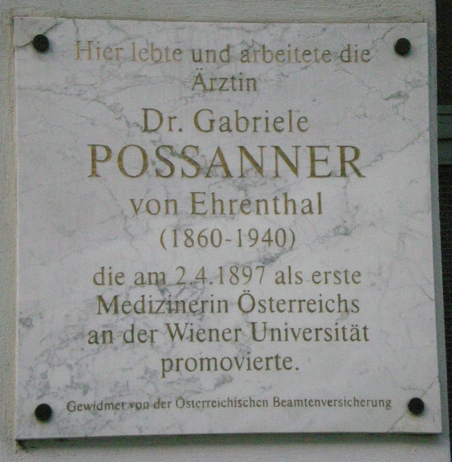 Gedenktafel für Gabriele Possanner in der Alser Straße im 9. Wiener Gemeindebezirk.